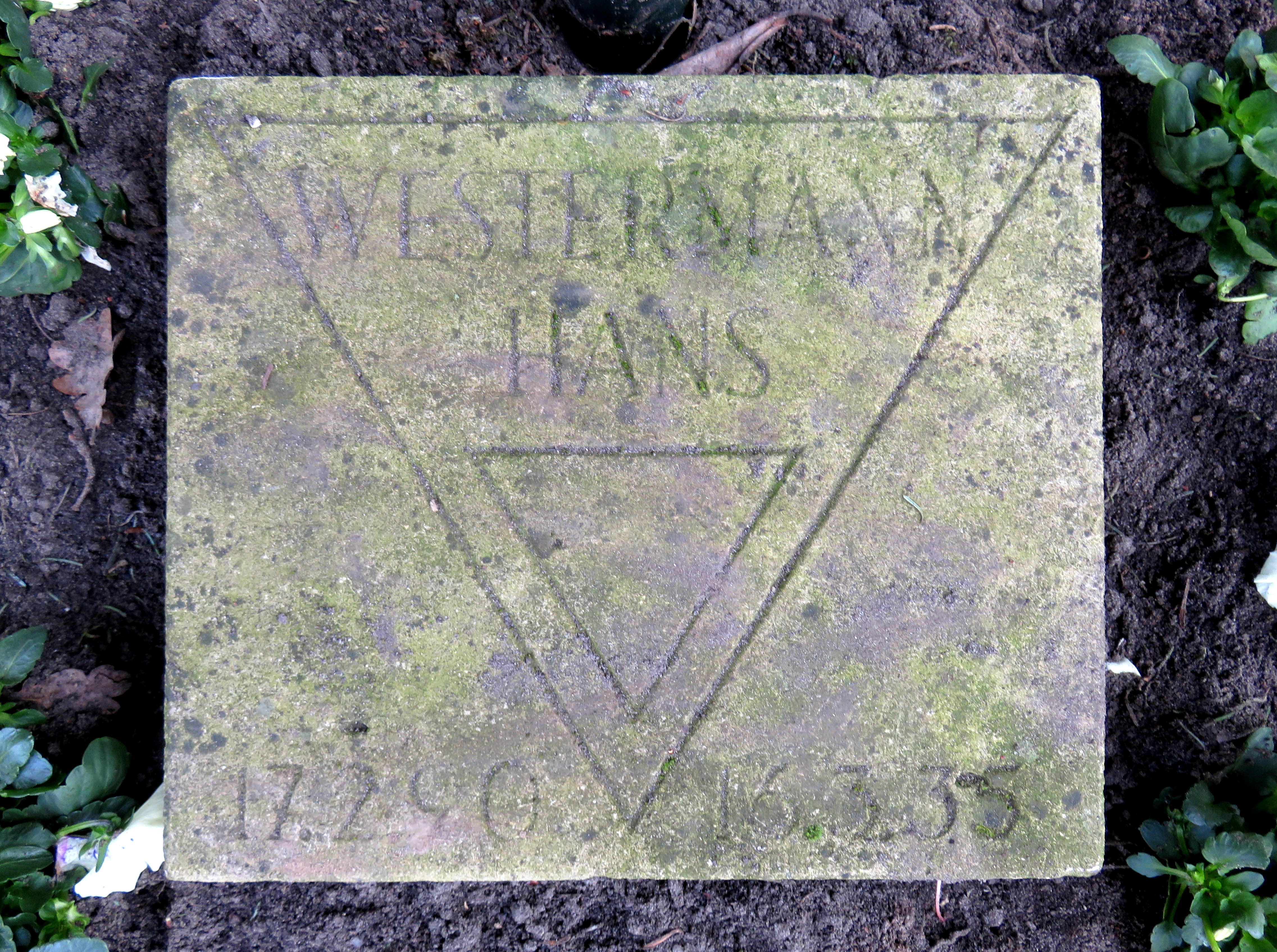 Kissenstein für den deutschen Widerstandskämpfer Hans Westermann im Ehrenhain Hamburgischer Widerstandskämpfer, Friedhof Ohlsdorf, Planquadrat K 5 (Bergstraße gegenüber dem Museum).